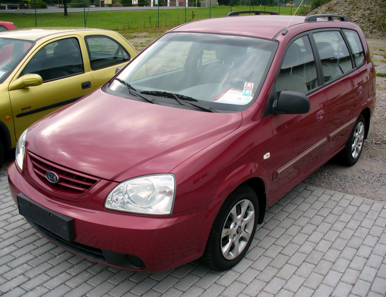 Kia Carens